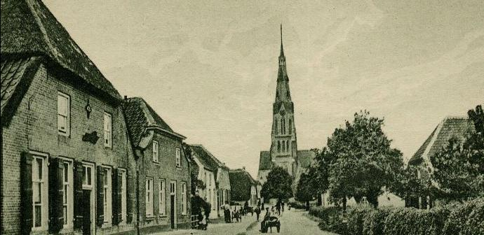 Oude Sint-Willibrorduskerk, Ammerzoden, 1915